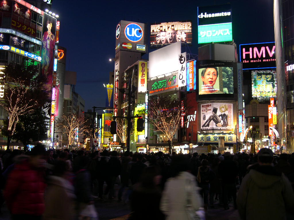 Shibuya at night